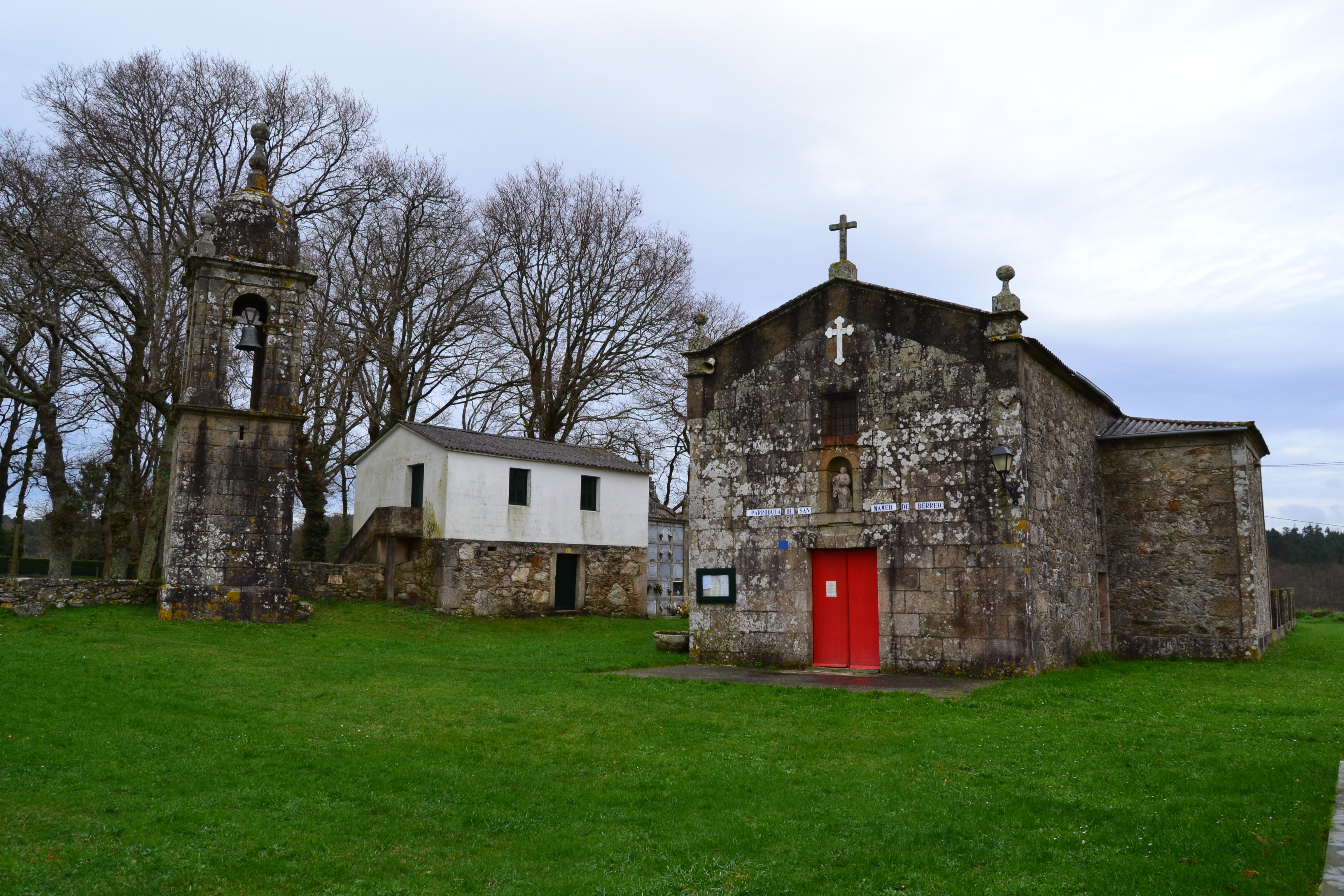 Campanario e Igrexa de Berreo